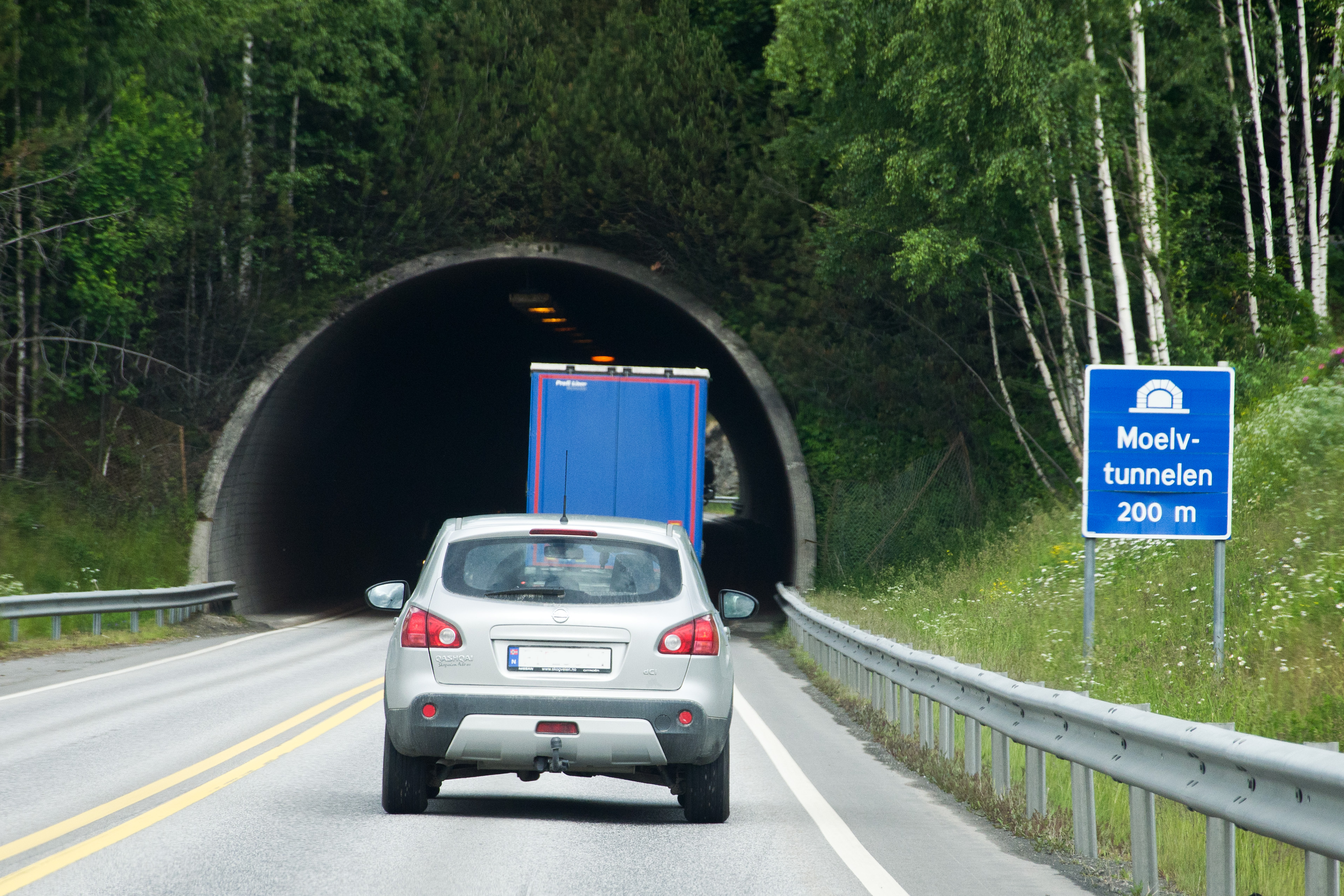 Moelvtunnelen på E6 i Hedmark